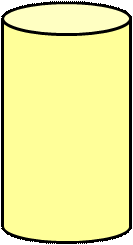 Cheminée beige des navires de la Royal Mail Lines utilisée au XX° siècle (de 1900 à 1972)